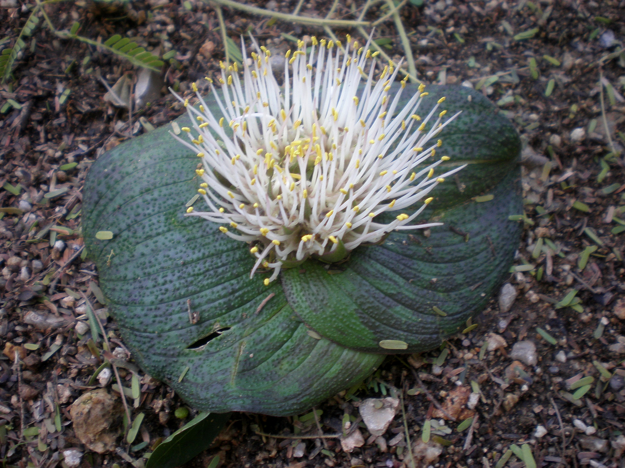 Jardín Botánico de Barcelona.